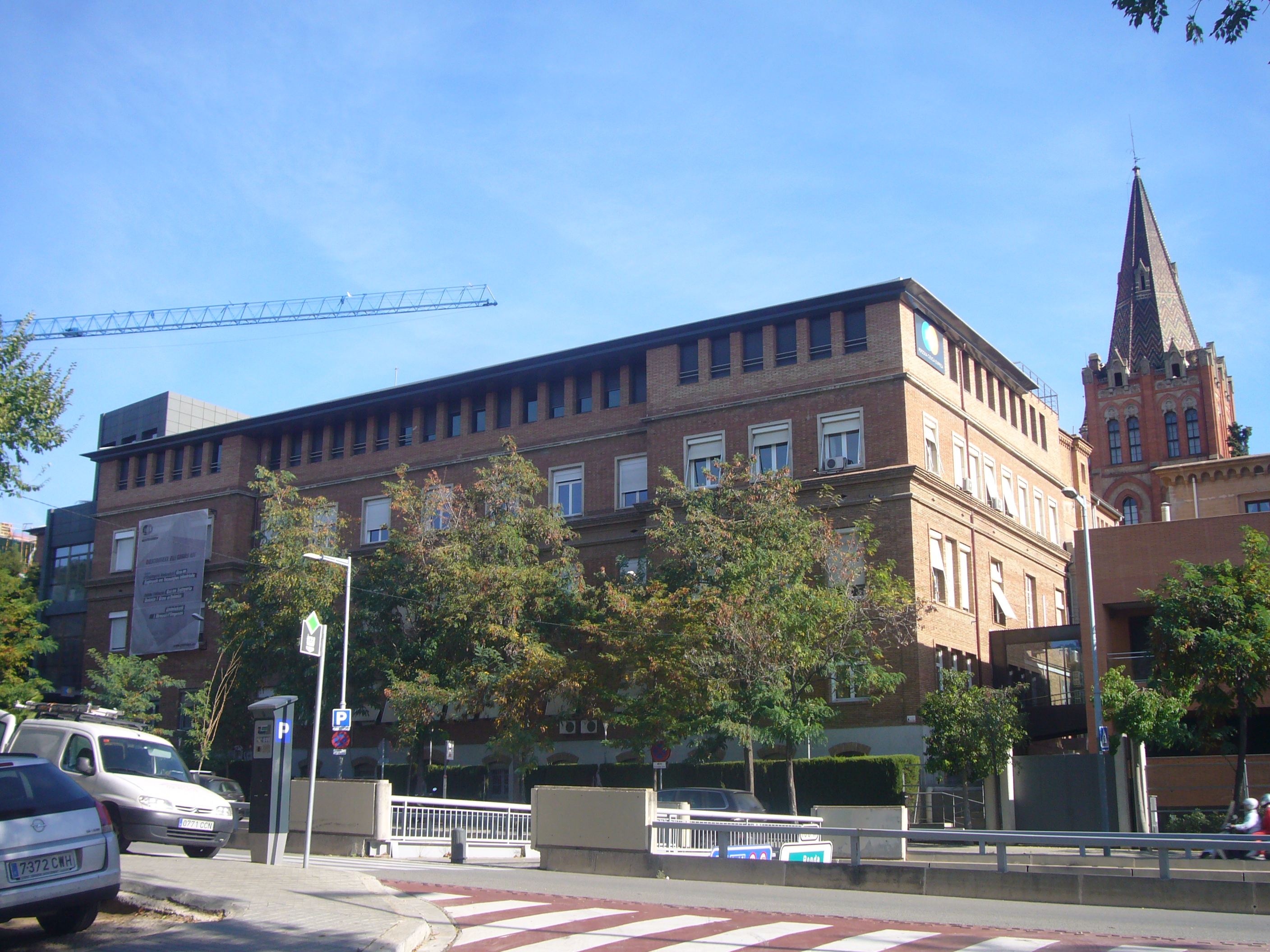 Institut Químic de Sarrià a la via Augusta de Barcelona. A la dreta una torre del Col·legi Sant Ignasi de Loiola dels Jesuites de Sarrià